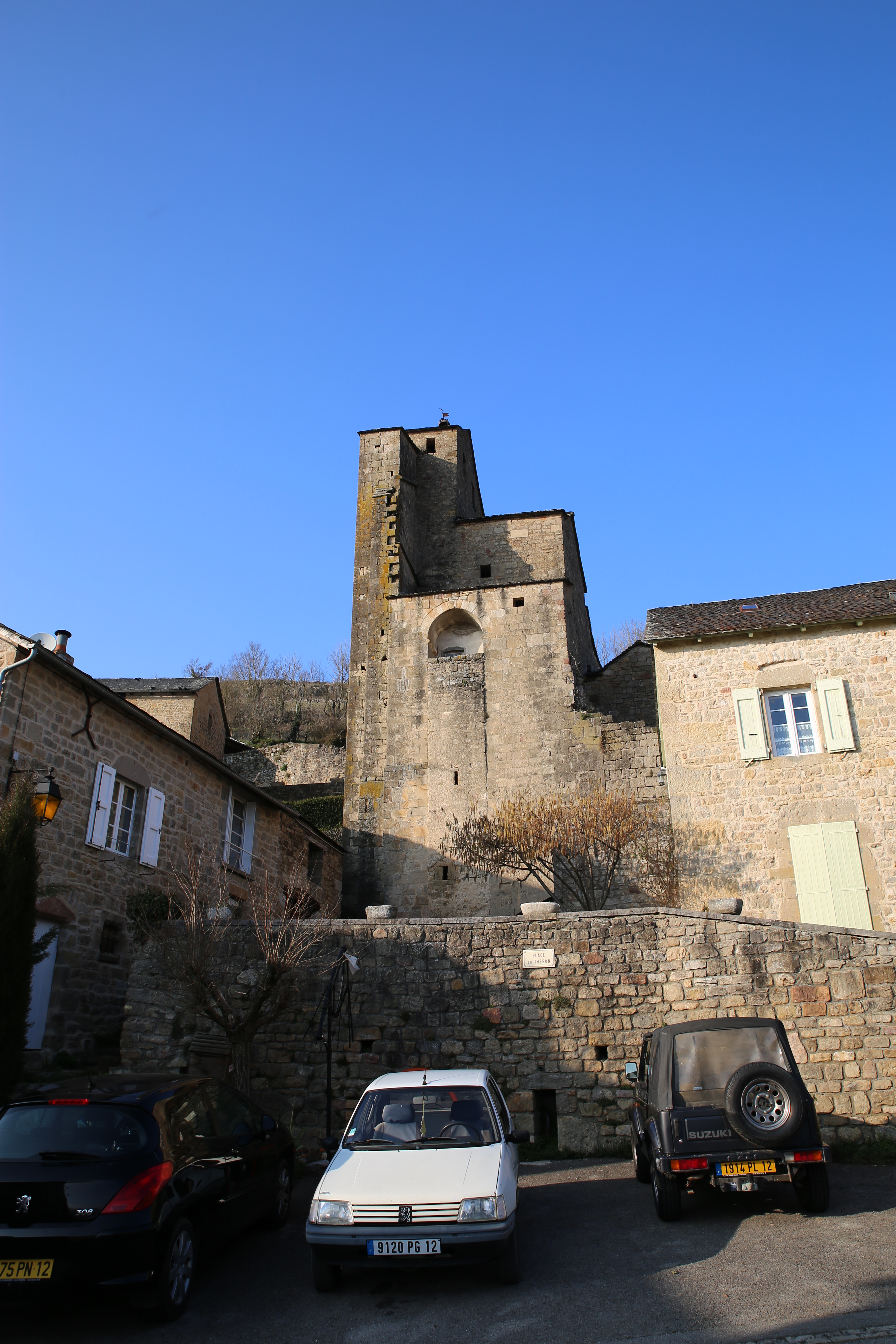 Eglise Saint-Grégoire de Lavernhe